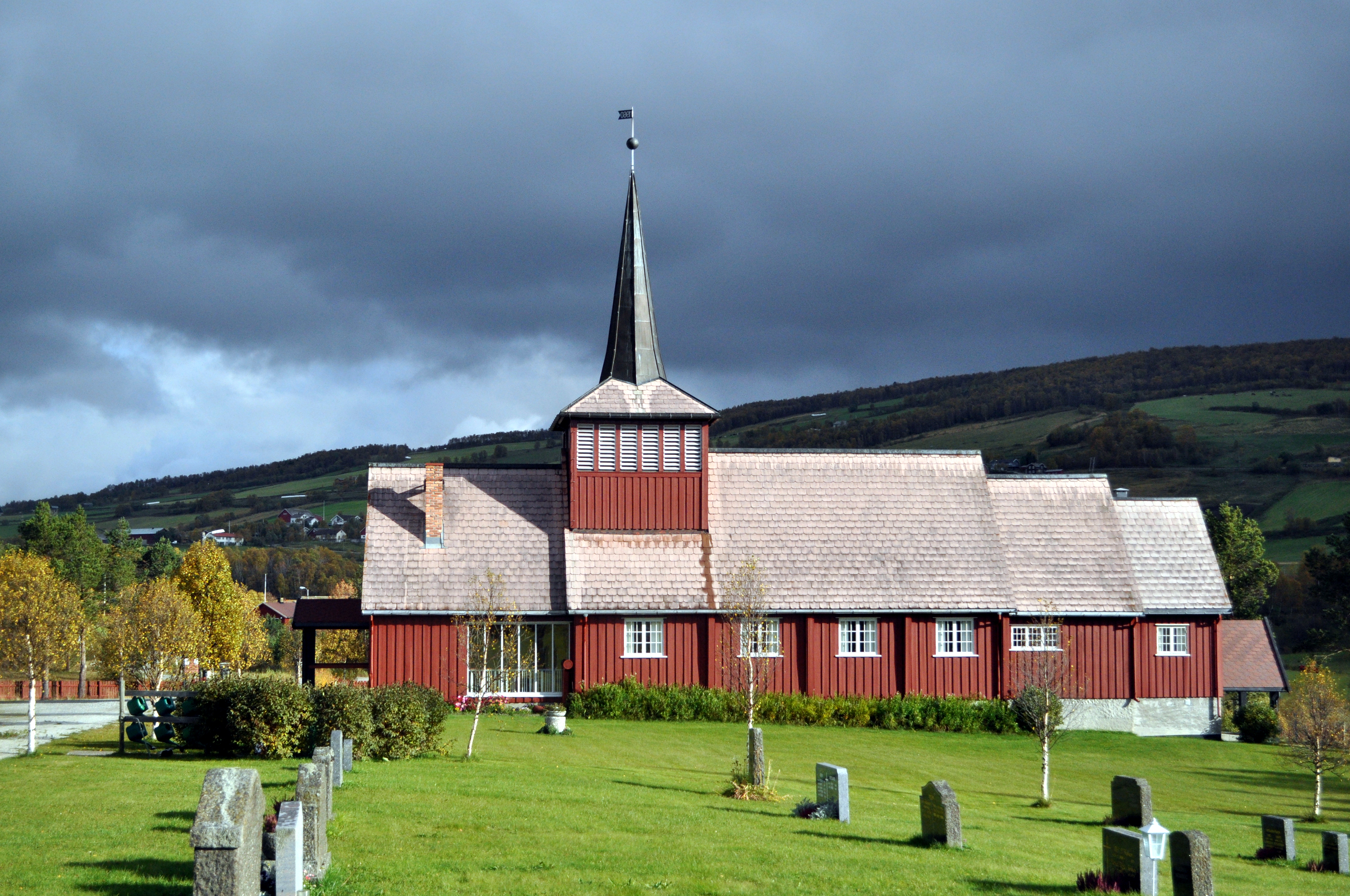 Dalsbygda kirke sett fra sørsiden en høstdag i 2013.